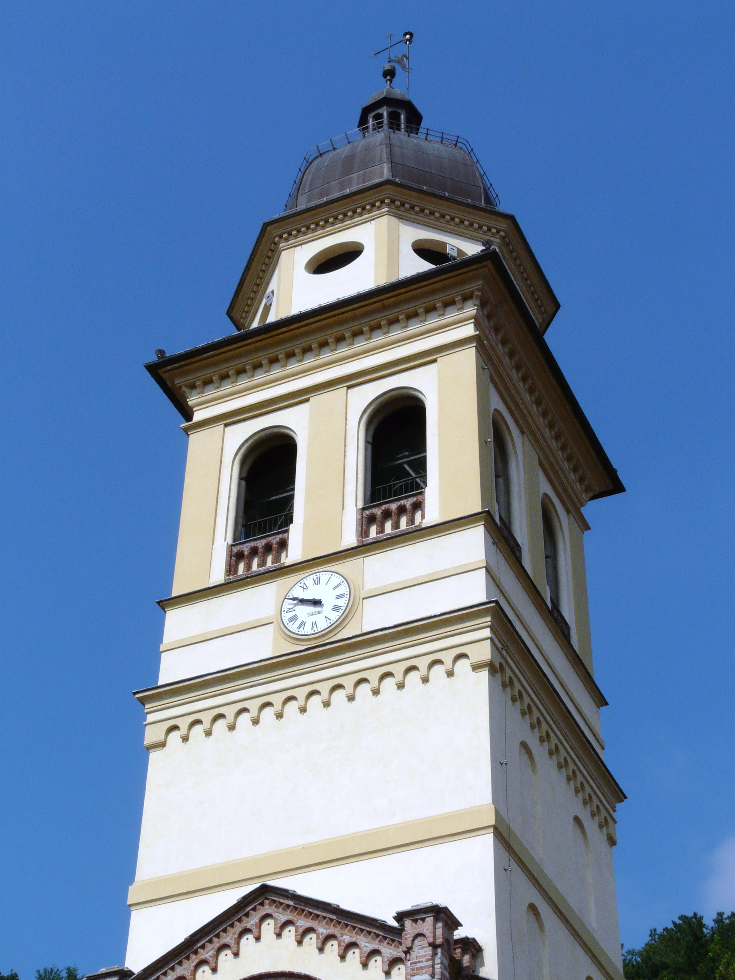 Chiesa di Nostra Signora dell'Assunta e di San Nazario e Celso, Voltaggio, Piemonte, Italia